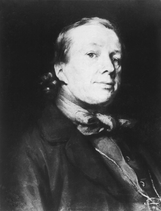 Porträt Hermann Wilhelm Soltau von Hermann Steinfurth (Schwarz-Weiß-Abbildung des Gemäldes), Öl auf Leinwand, 47 x 57 cm, Hamburger Kunsthalle